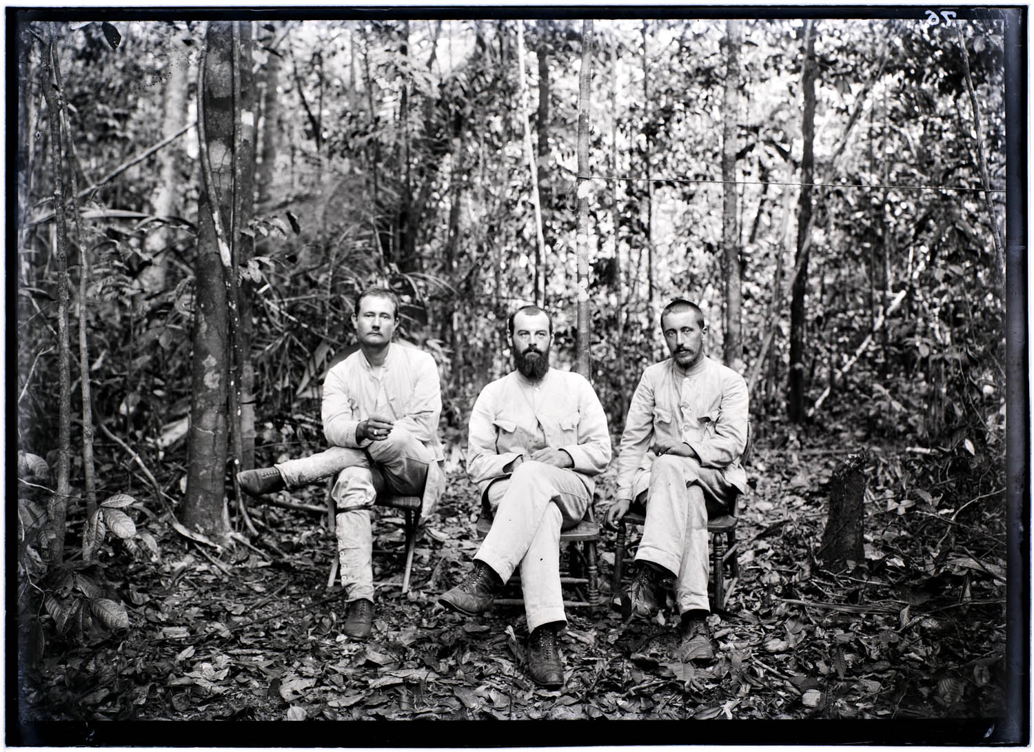 Expeditieleden A. Franssen Herderschee, G.M. Versteeg en C.H. de Goeje op het bivak bij de Papadron-val in de Paloemeu-rivier